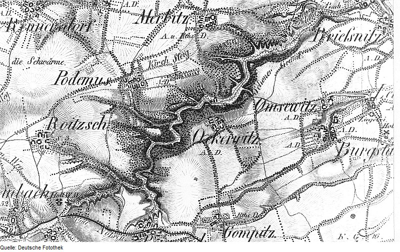 Original image description from the Deutsche Fotothek Dresden-Ockerwitz. Oberreit, Sect. Dresden, 1821/22